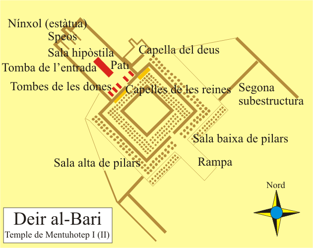 Temple de Mentuhotep I (II) a Deir al-Bari